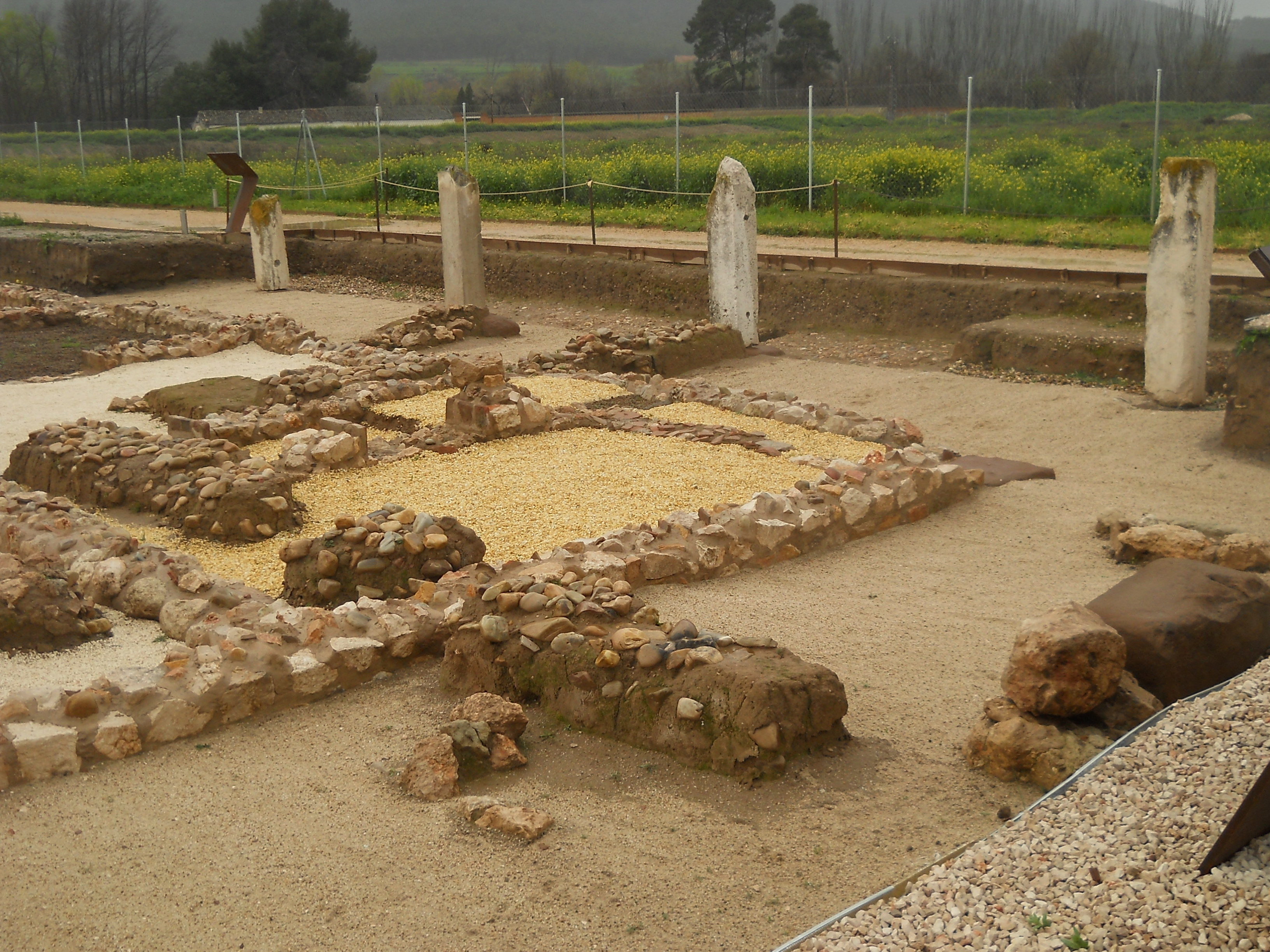 Casa de Marte, Yacimiento de Complutum, Alcalá de Henares, Madrid, España